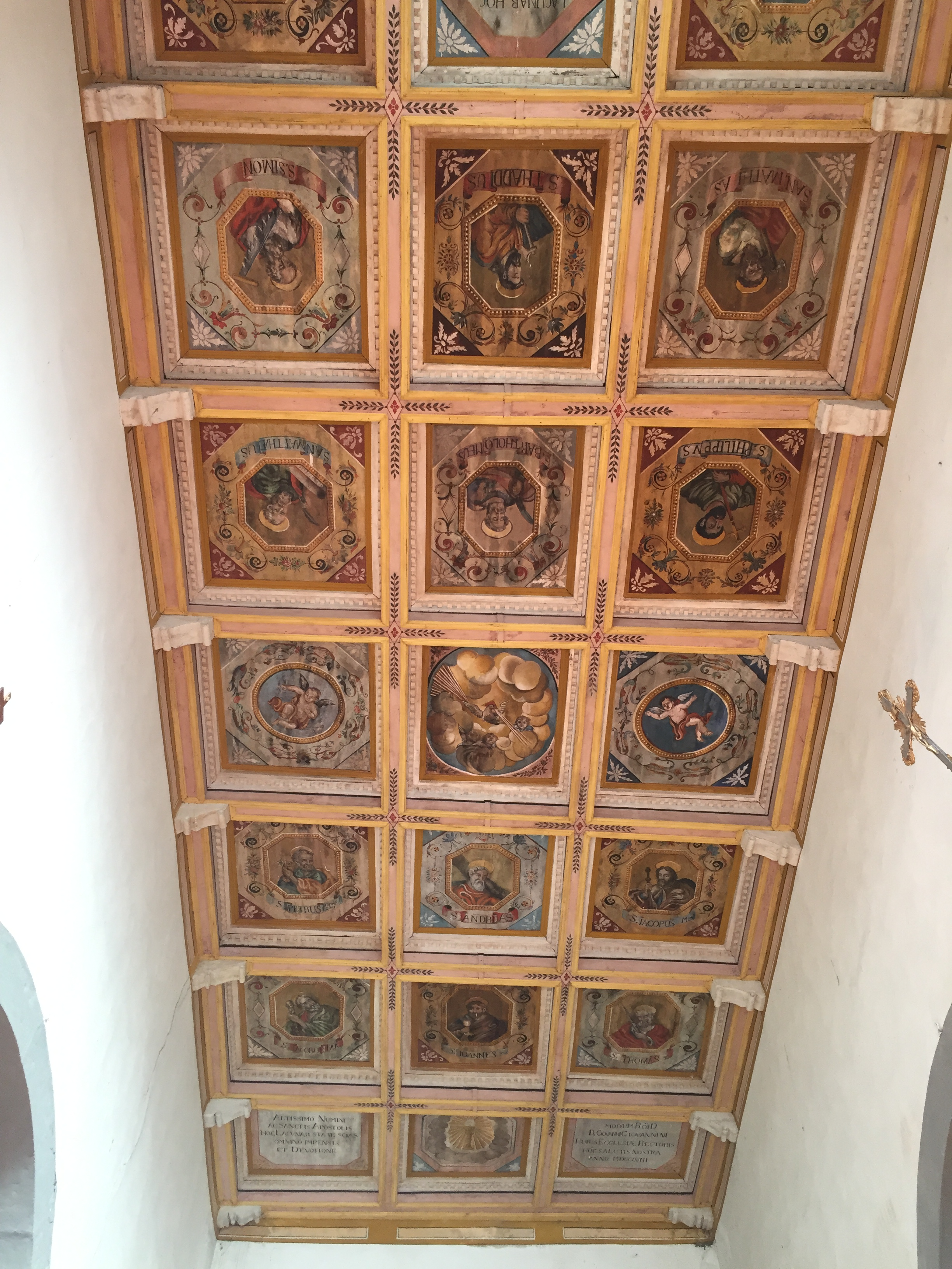 Soffitto ligneo a cassettoni